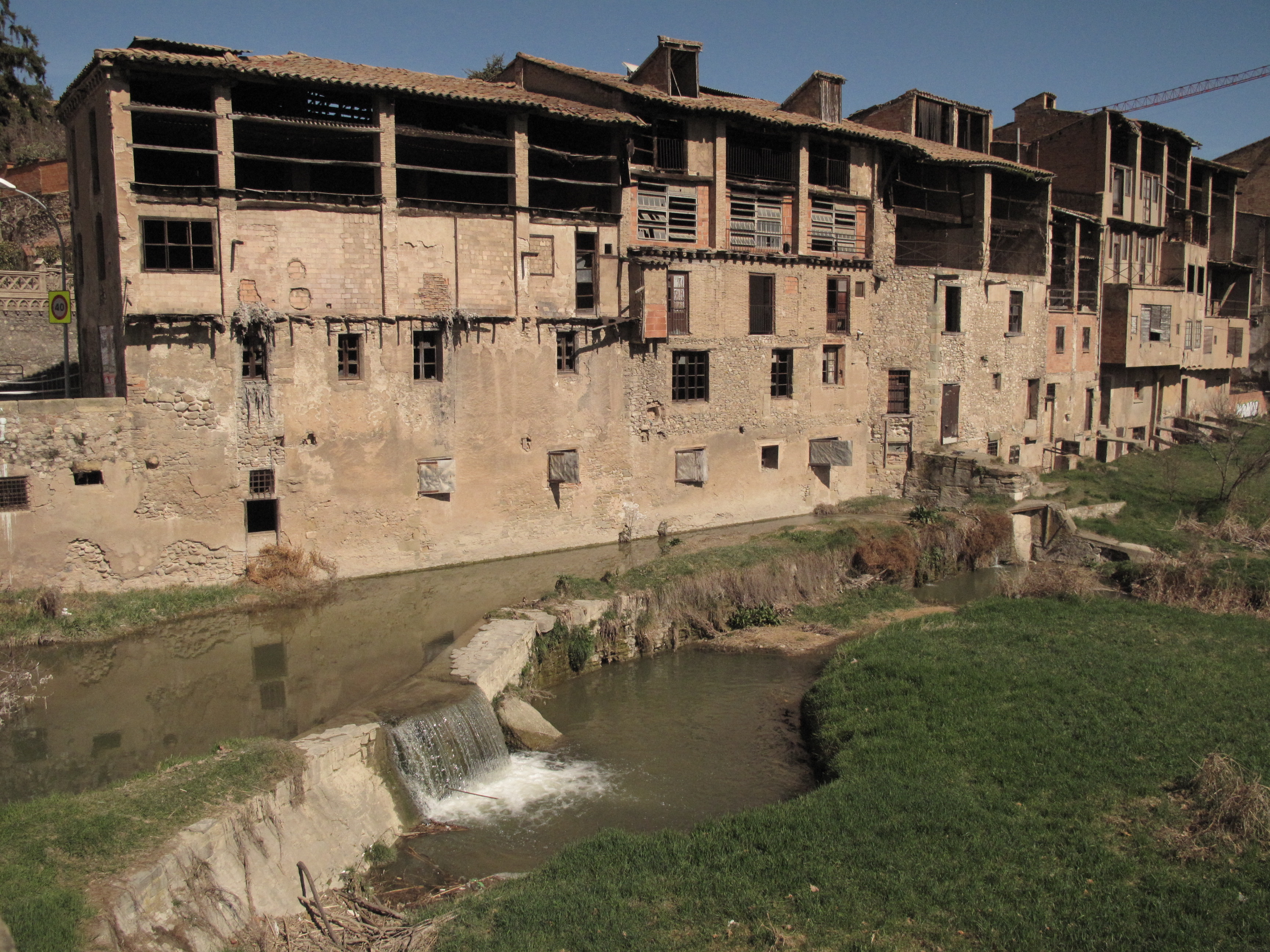 Barri de les Adoberies (Vic) Object location41° 55′ 40.05″ N, 2° 15′ 25.44″ E